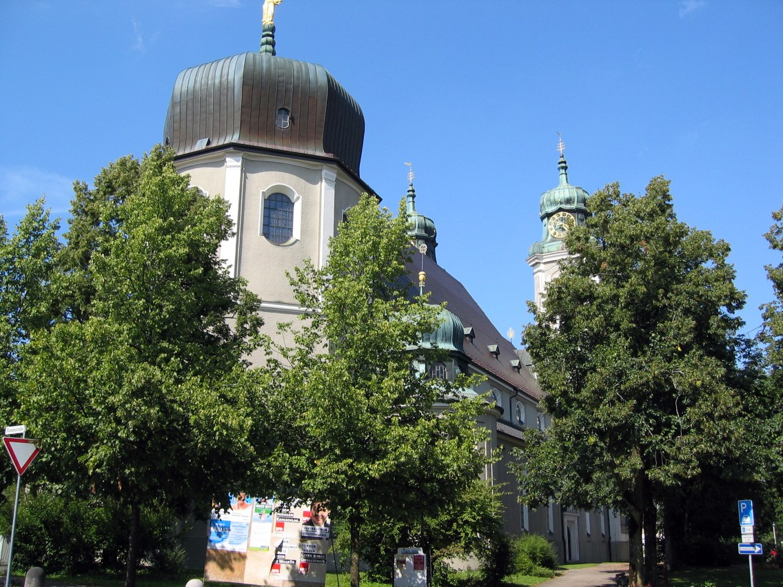 Stadtpfarrkirche St. Peter und Paul, Lindenberg im Allgäu, Westseite